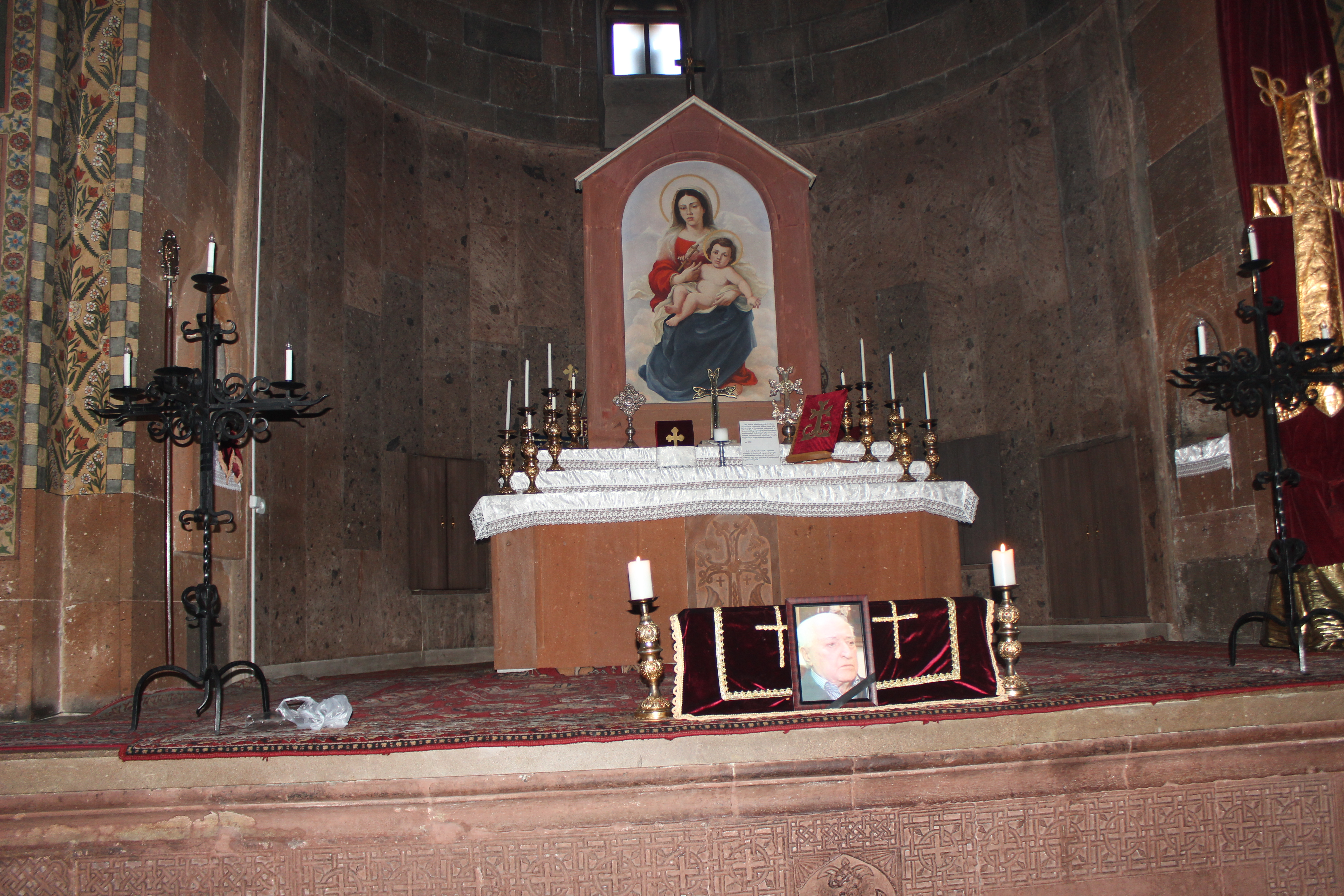 Արա Արծրունու հուղարկավորության արարողությունը ՝ Քանաքեռի Սուրբ Հակոբ եկեղեցում